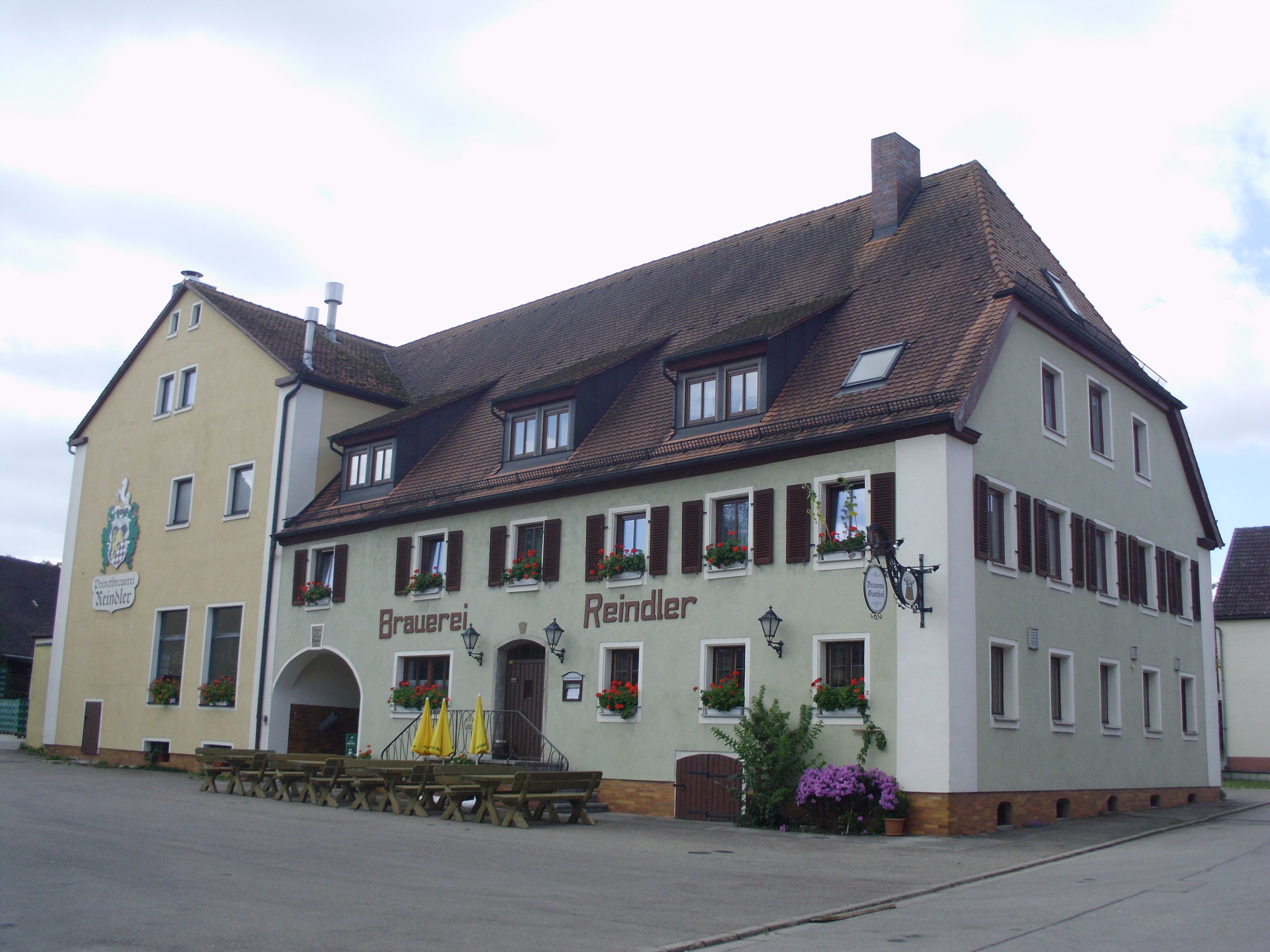 Jochsberg, Ortsteil von Leutershausen im Landkreis Ansbach, ehemalige zum Schloss gehörige Brauerei (heute Brauerei Reindler)